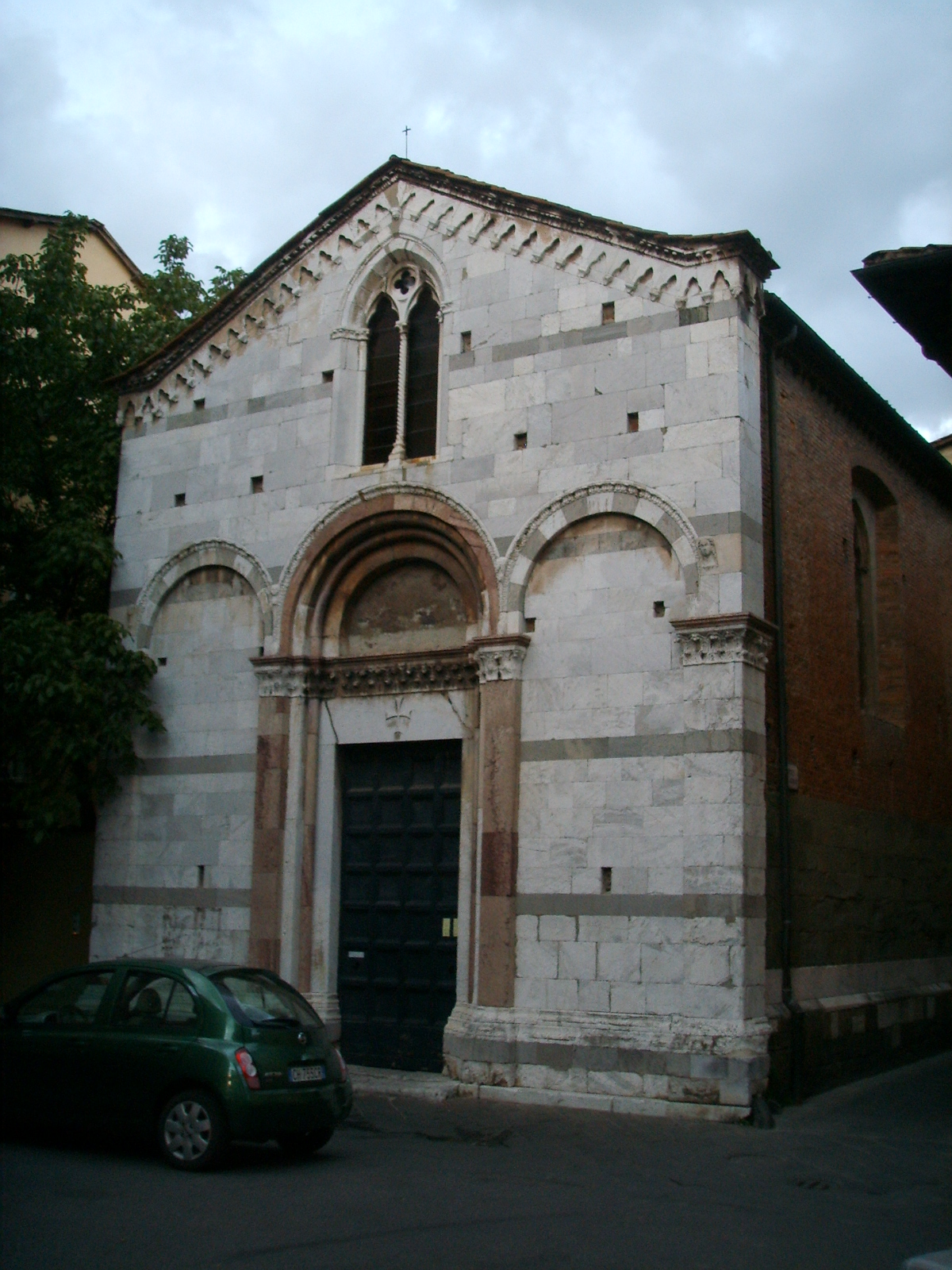 Chiesa di Santa Giulia lucca